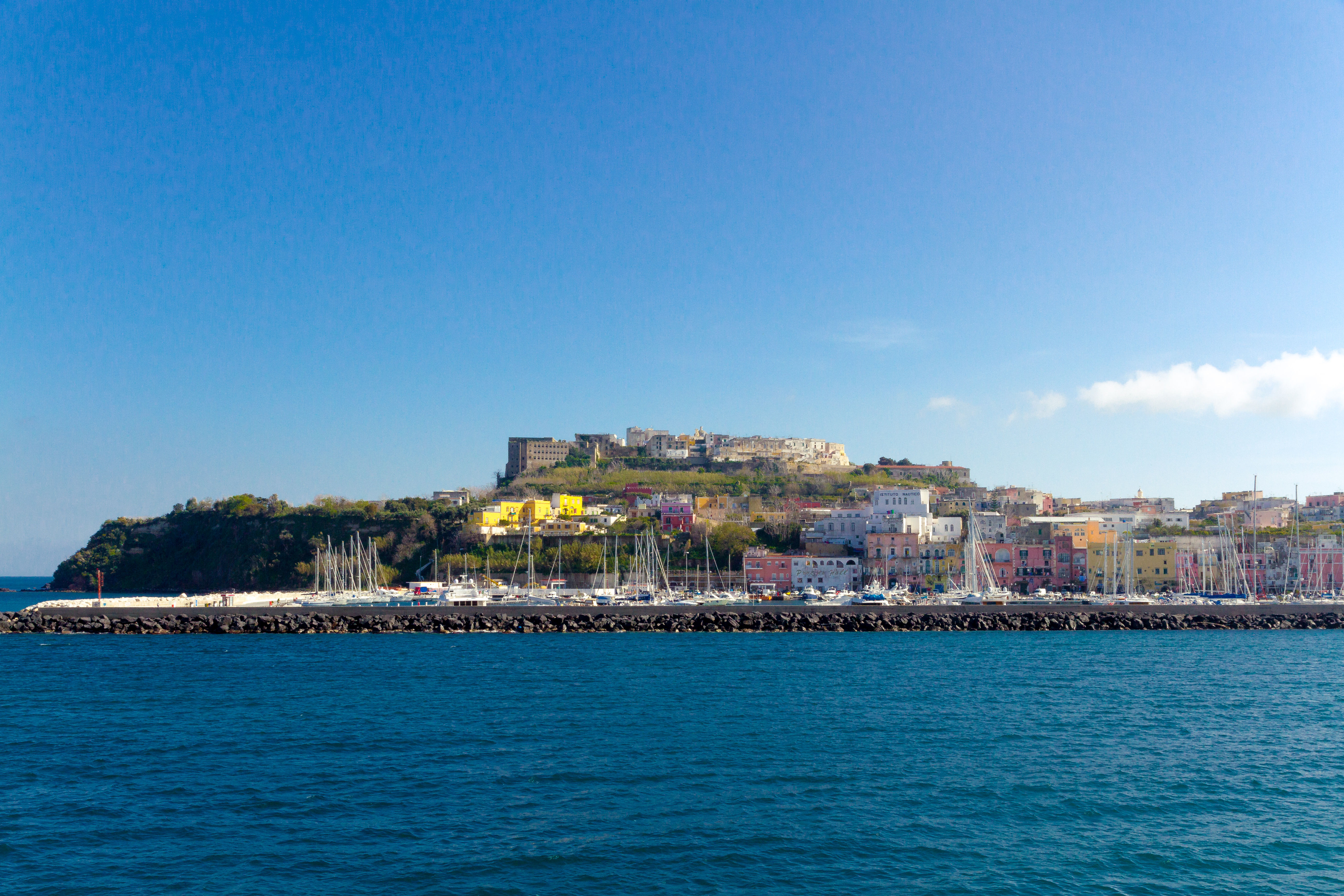 Procida - Terra Murrata